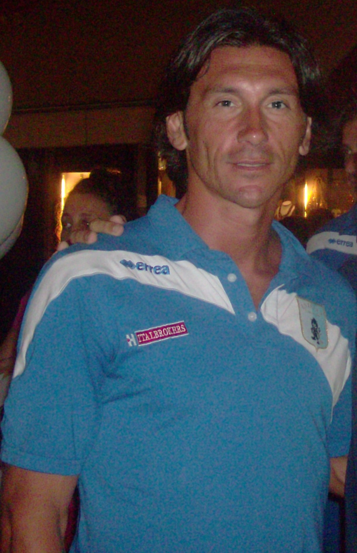 Ighli Vannucchi con la divisa dell'Entella